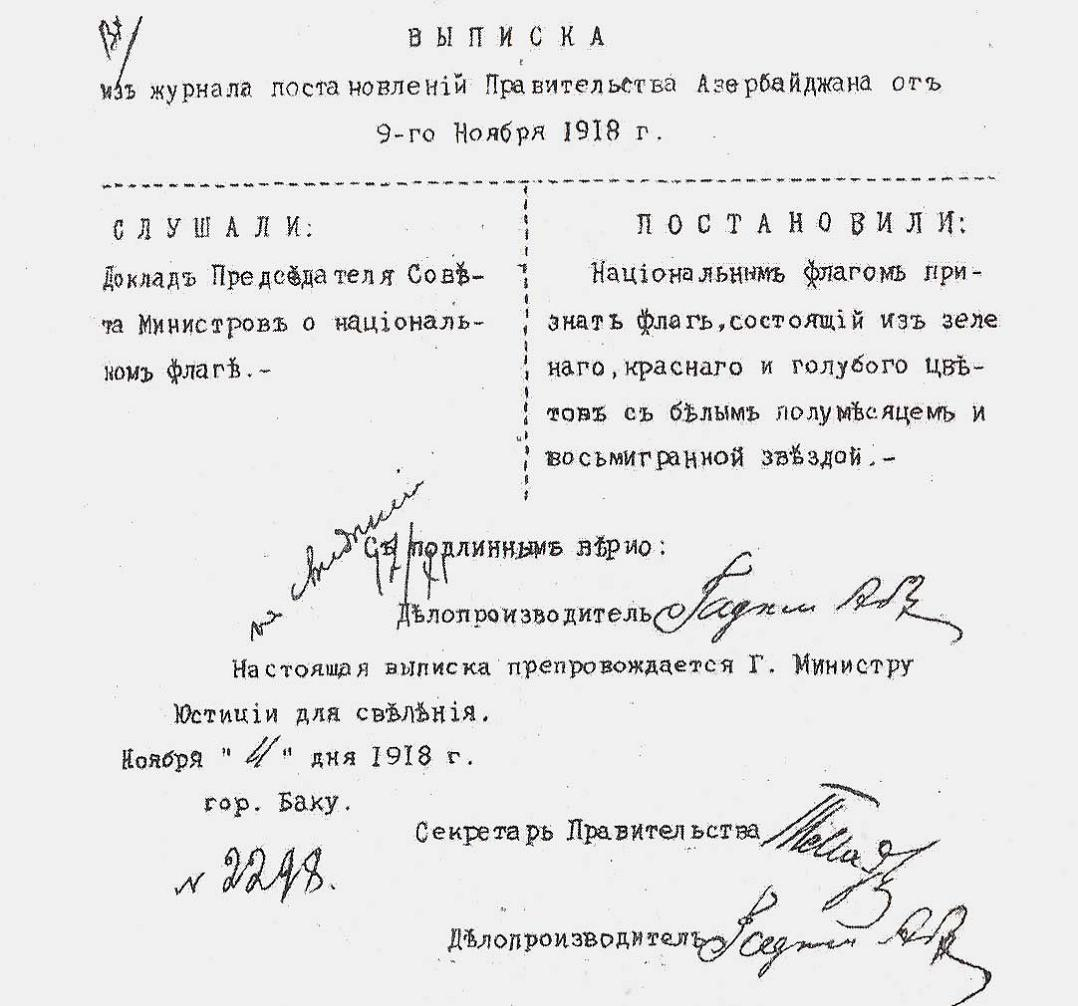 ADR hökumətinin 9 noyabr 1918-ci il iclasındakı protokoldan bayraq haqqında sənəd.